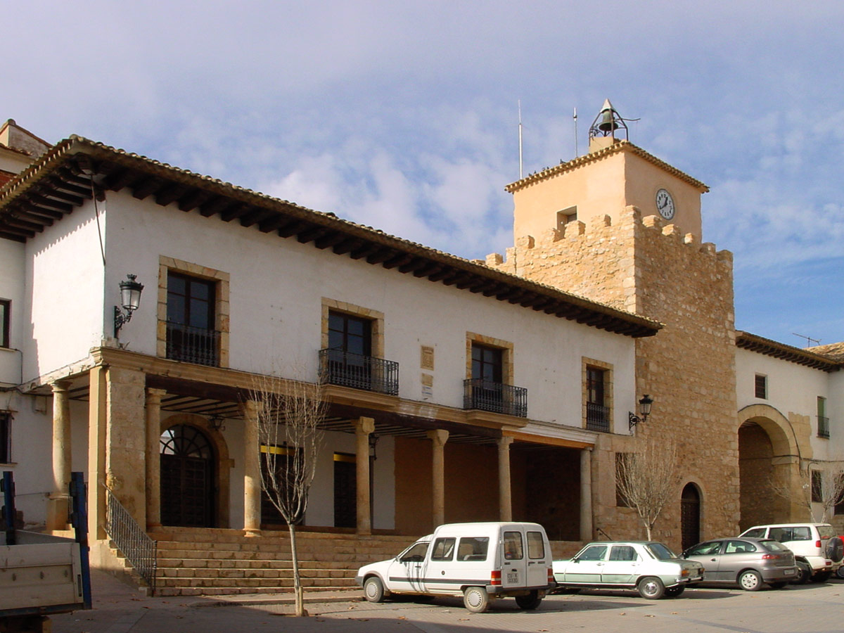 Centro Urbano de Iniesta